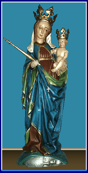 Figura gotycka MB tzw.depcząca szatana XV wiek ok.1470 r.